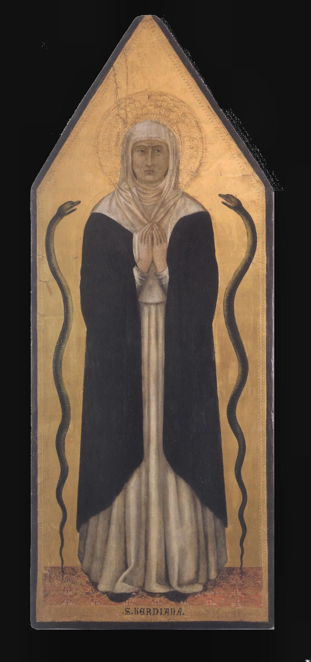 Anonimo pittore senese del XIV secolo, Santa Verdiana, tavola, Museo di Santa Verdiana, Castelfioretino